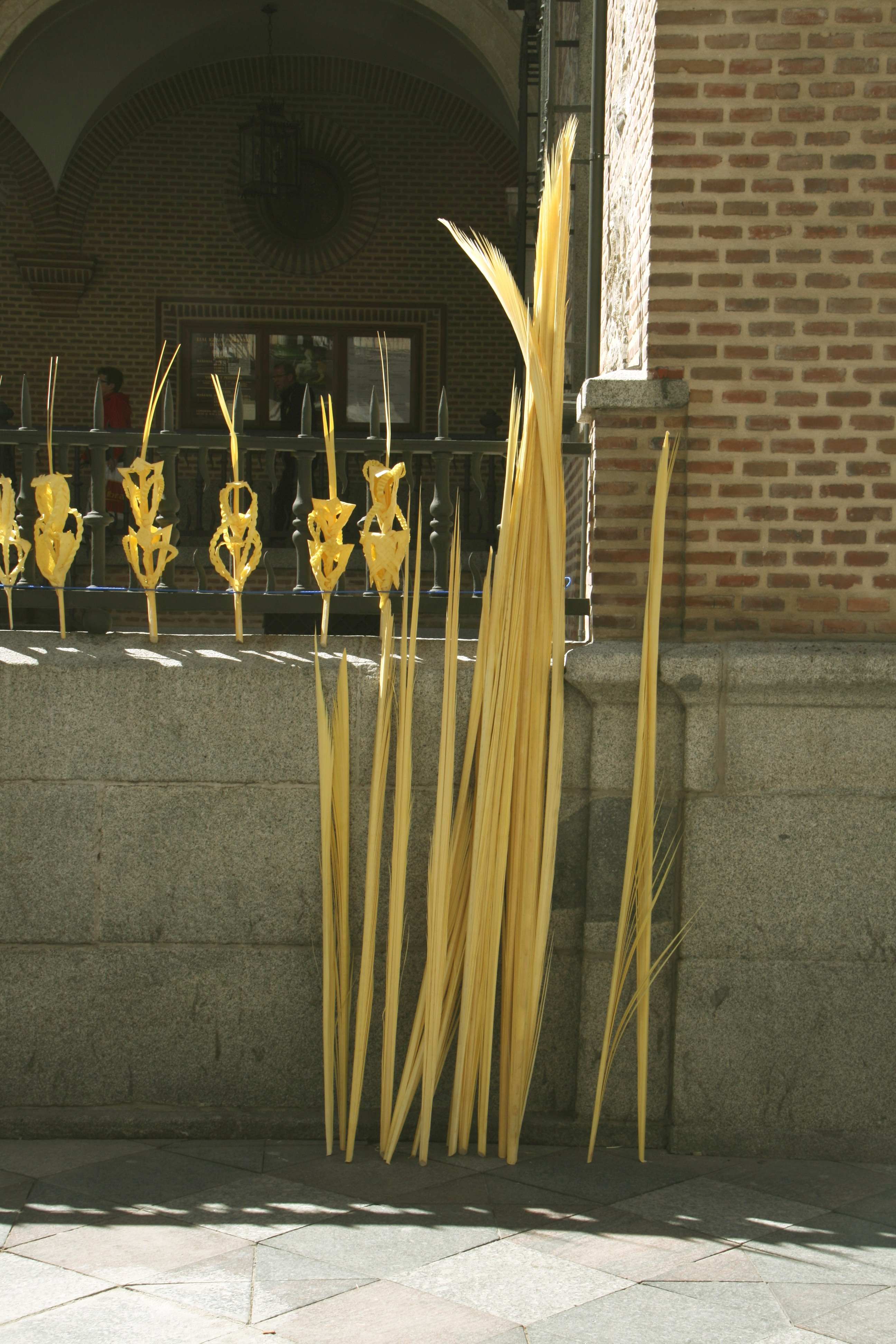 Palmeras de Semana Santa